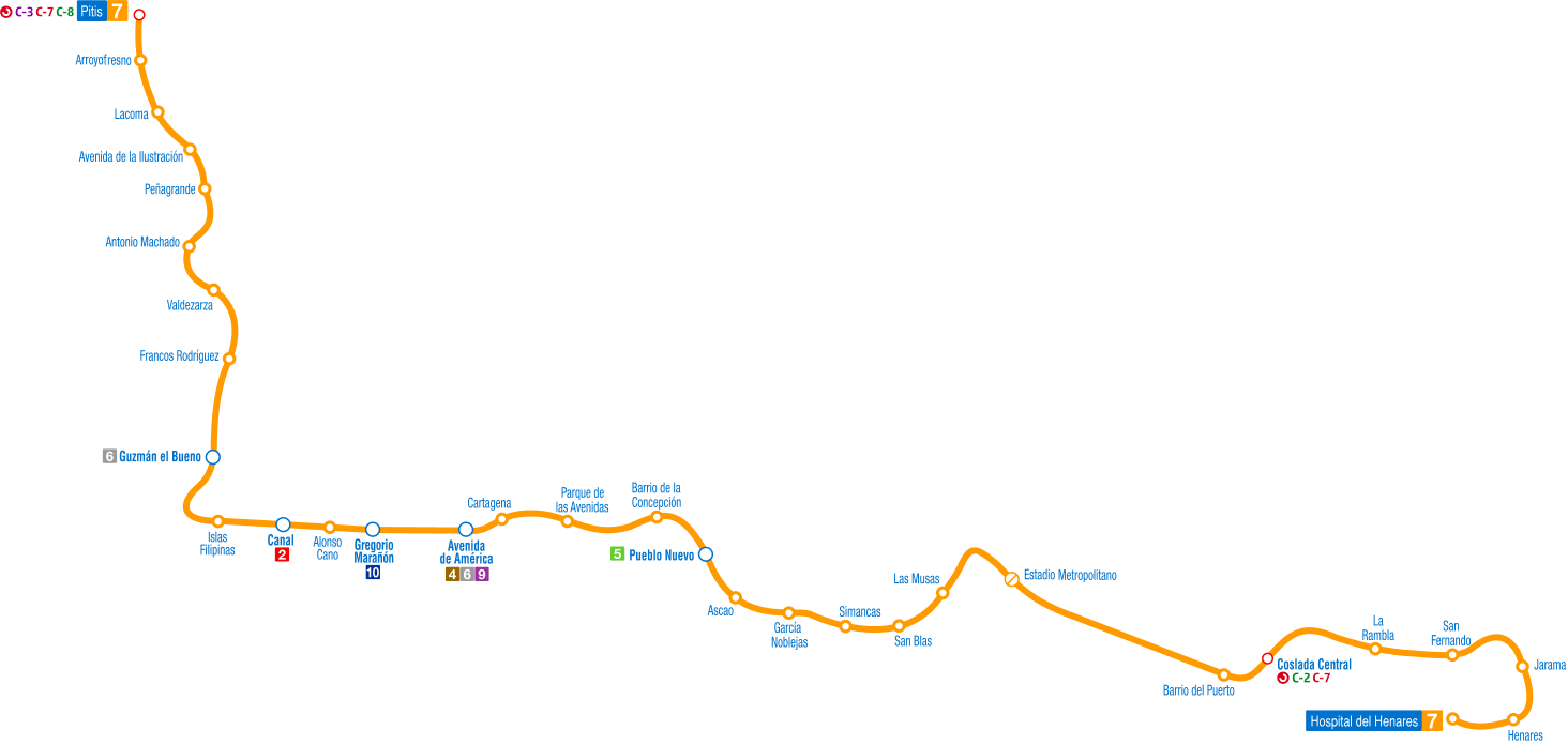 Recorrido de la línea 7 del Metro de Madrid